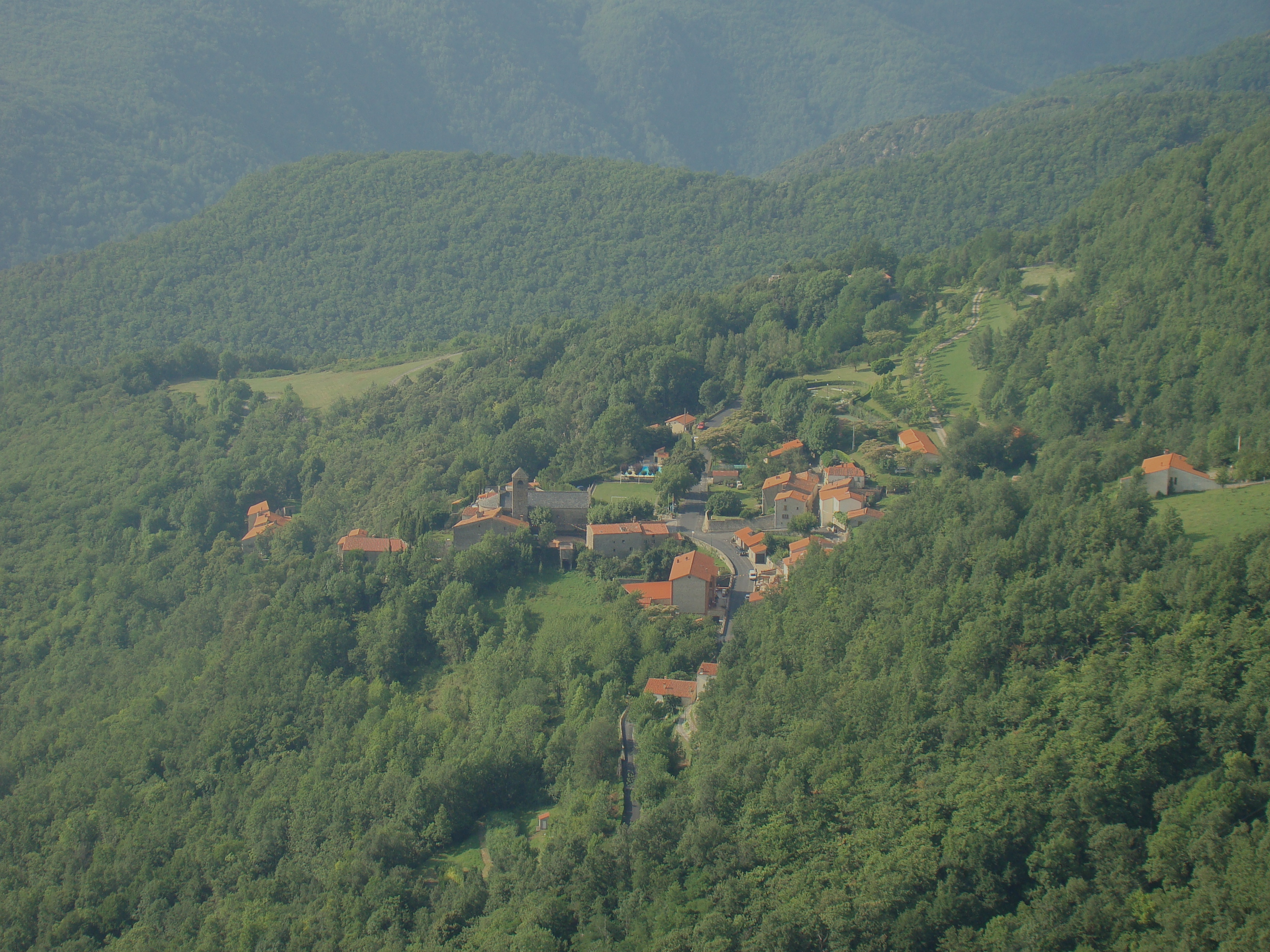 Montferrer depuis le château